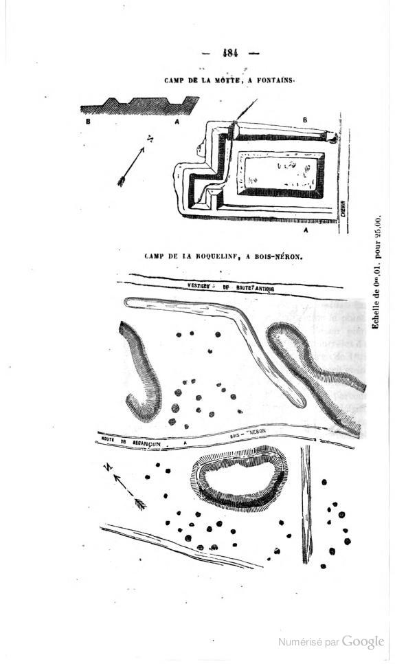 Relevé des vestiges du camp gaulois